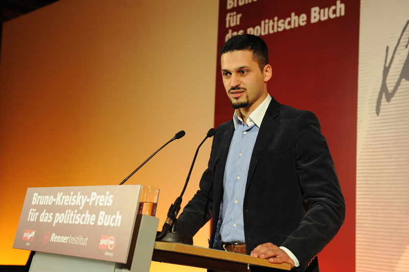 Rede von Farid Hafez beim Bruno-Kreisky-Anerkennungspreis 2010